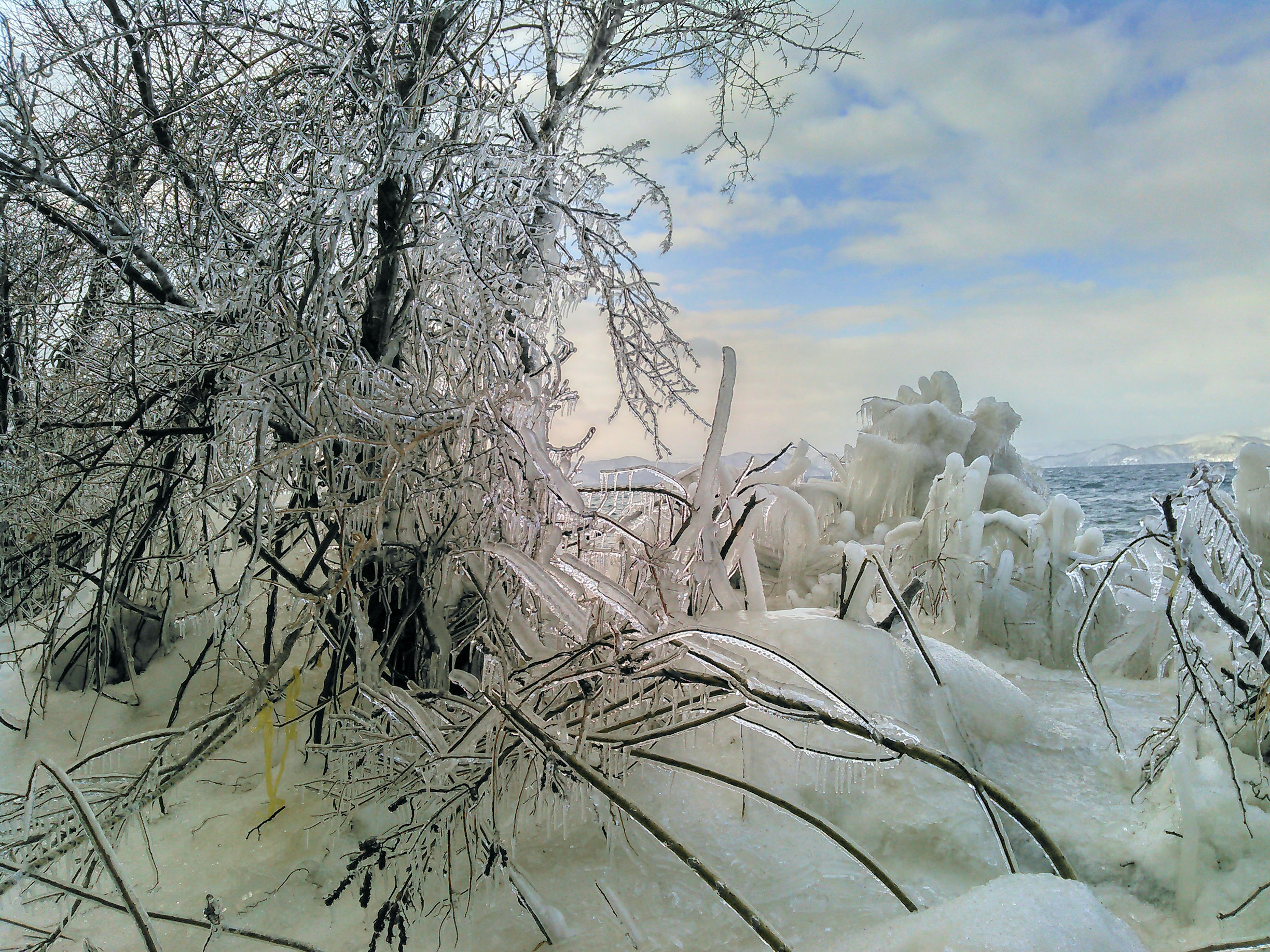 猪苗代湖 天神浜付近のしぶき氷